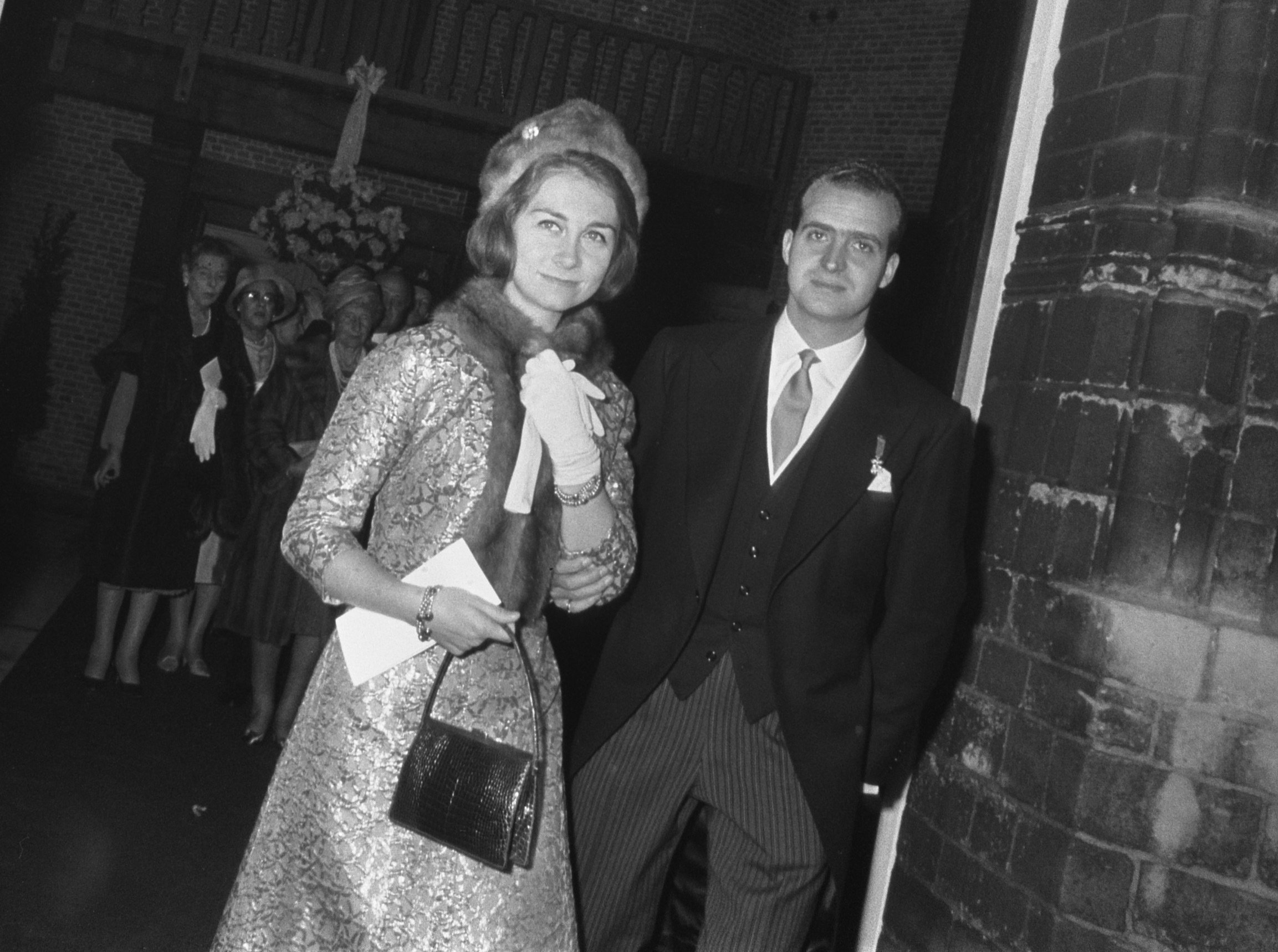 Collectie / Archief : Fotocollectie Anefo Reportage / Serie : Huwelijk prins Karl von Hessen en gravin Yvonne Szapary in Den Haag Beschrijving : Aankomst van prins Juan Carlos van Bourbon en zijn vrouw prinses Sophia Datum : 18 april 1966 Locatie : Den Haag, Zuid-Holland Trefwoorden : huwelijken, kerken, vorstenhuizen Persoonsnaam : Juan Carlos van Bourbon, prins, Sofia, prinses Fotograaf : Fotograaf Onbekend / Anefo Auteursrechthebbende : Nationaal Archief Materiaalsoort : Negatief (zwart/wit) Nummer archiefinventaris : bekijk toegang 2.24.01.05 Bestanddeelnummer : 919-0426